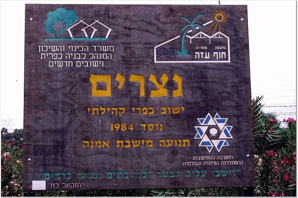 נצרים התמונות באדיבות קטיף.נט (קישור) אתר האינטרנט של גוש קטיף. צילם: מוטי סנדר.